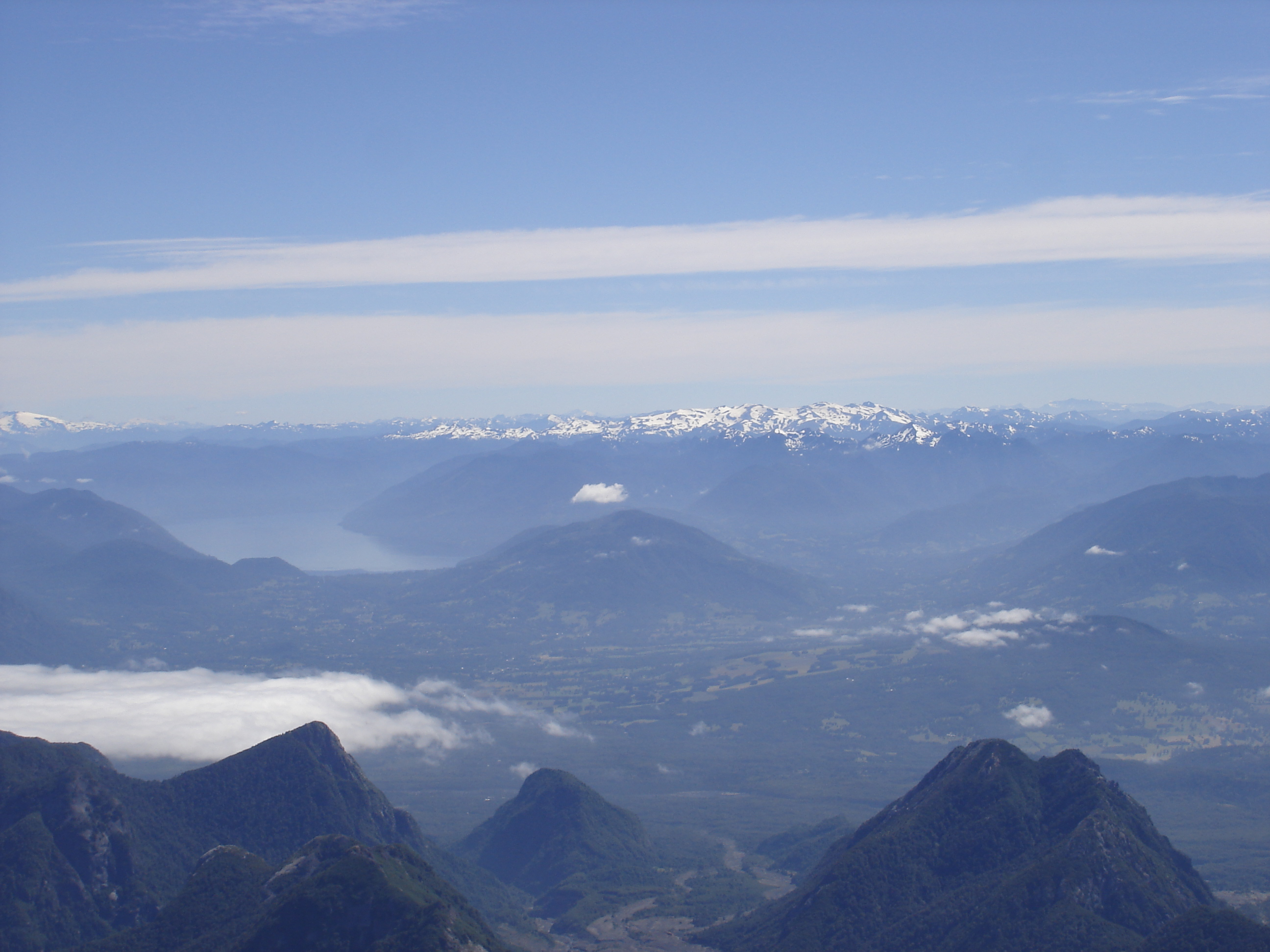 Nevados de Sollipulli as seen from Villarrica Volcano, Chile.